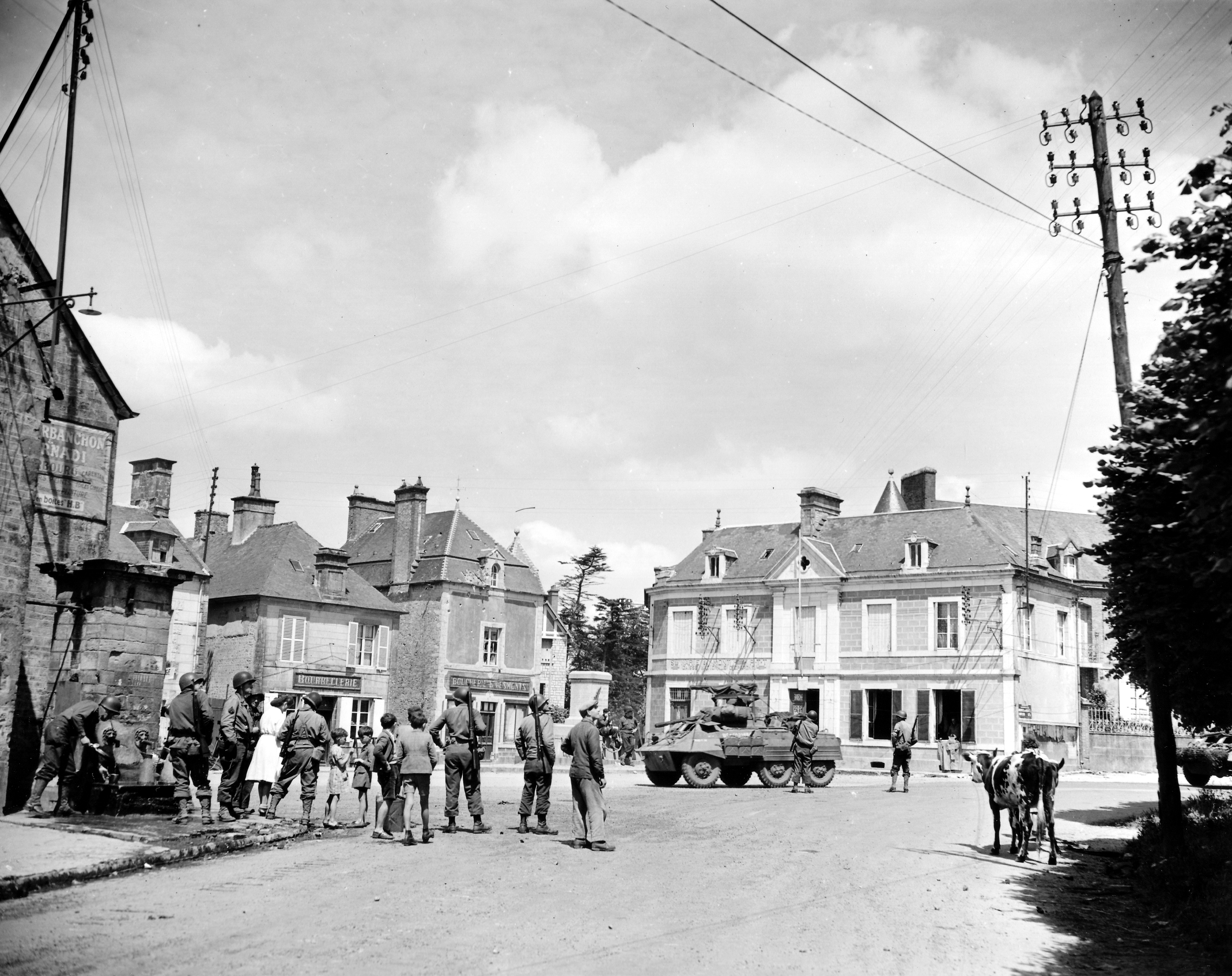 Un groupe de soldats américains dont 4 MP à la fontaine du village entourés par femmes et enfants,le 12 juin à Sainte-Marie-du-Mont. Le GI à gauche nettoie ses gamelles. Le même groupe sur 3 photos : p011591, p011592 et p011594. Sur les façades des bâtiments : BOURRELLERIE, BOUCHERIE E. DESMONTS, l'étage et la fenêtre de toit ont été mitraillés. Le bâtiment derrière le blindé M 8 : Ste MARIE du MONT PTT CAISSE NATIONALE d'ÉPARGNE Un GI est assis sur le Monument aux morts, voir ici: Un autre à l'intérieur de la Caisse d'Epargne, fenêtre en bas à droite. Une fermière avec deux vaches normandes. Le même lieu a été photographié le 7 juin avec d'autres personnages voir les p011582 et p011585. Voir ici chez Gettyimages en plan rapproché Un montage de plusieurs photos avec la même femme Marie-Esther Duchenes et des paras